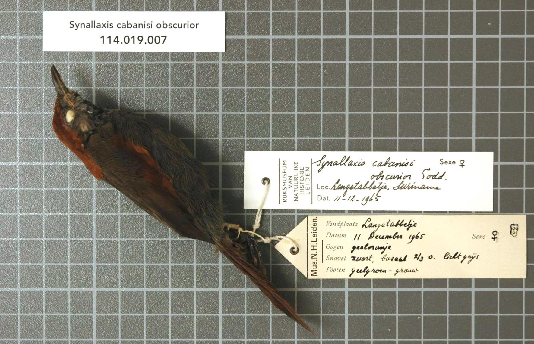 Synallaxis cabanisi obscurior Todd, 1948